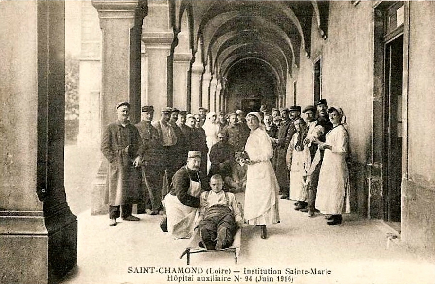 Saint-Chamond (Loire), hôpital complémentaire n° 94 dans le Collège Saint-Marie (juin 1916), carte postale ancienne (non grevée de droits). Légende de la carte dit "hôpital auxiliaire" mais c'est une erreur ; il s'agit bien d'un hôpital complémentaire.